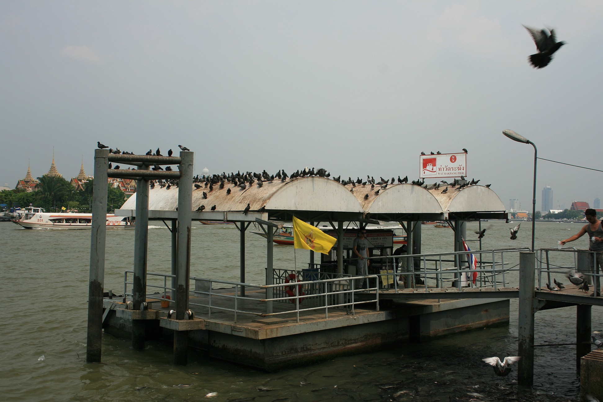 Wat Rakang Pier